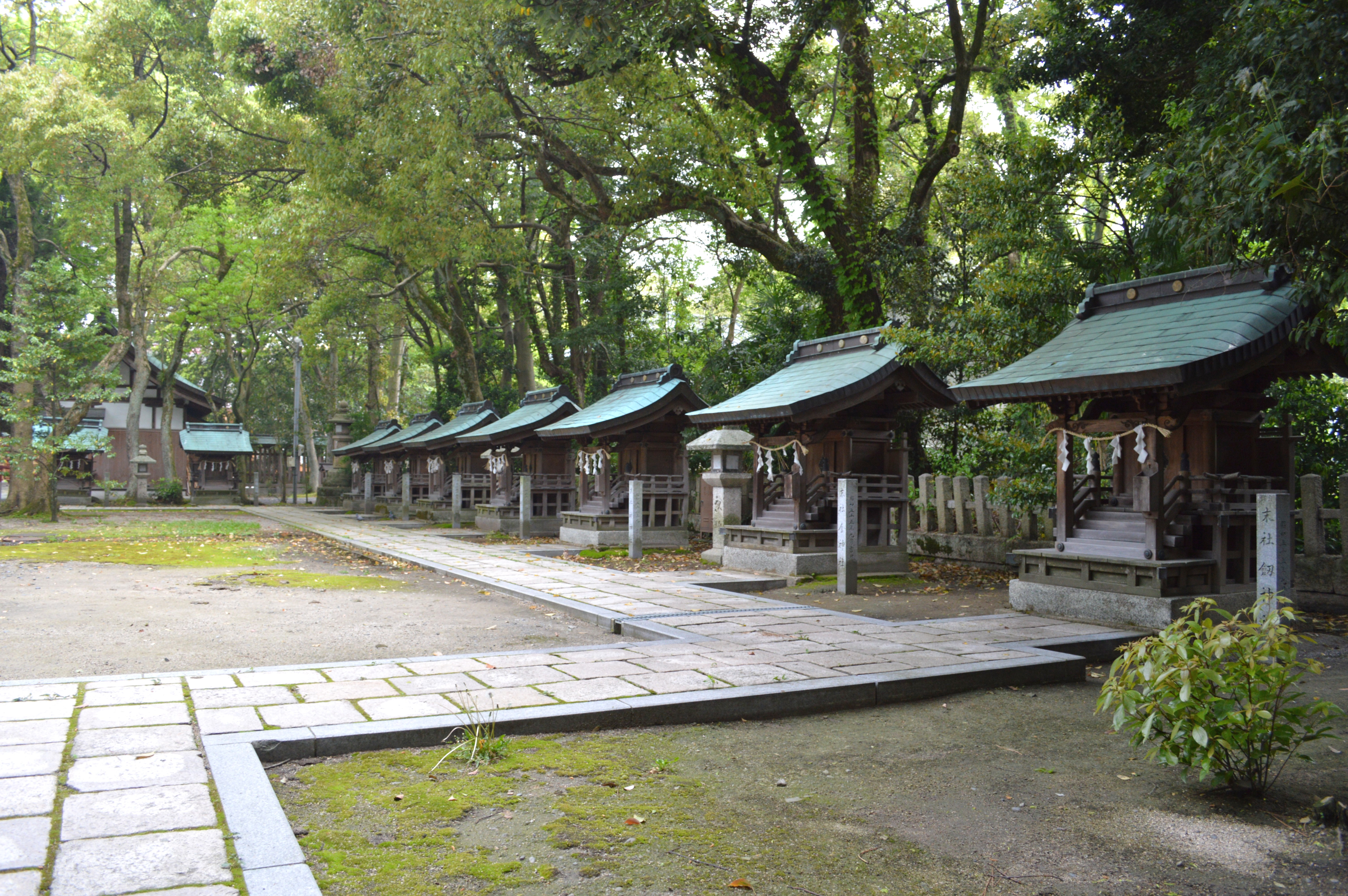 九社の宮 (氣比神宮)